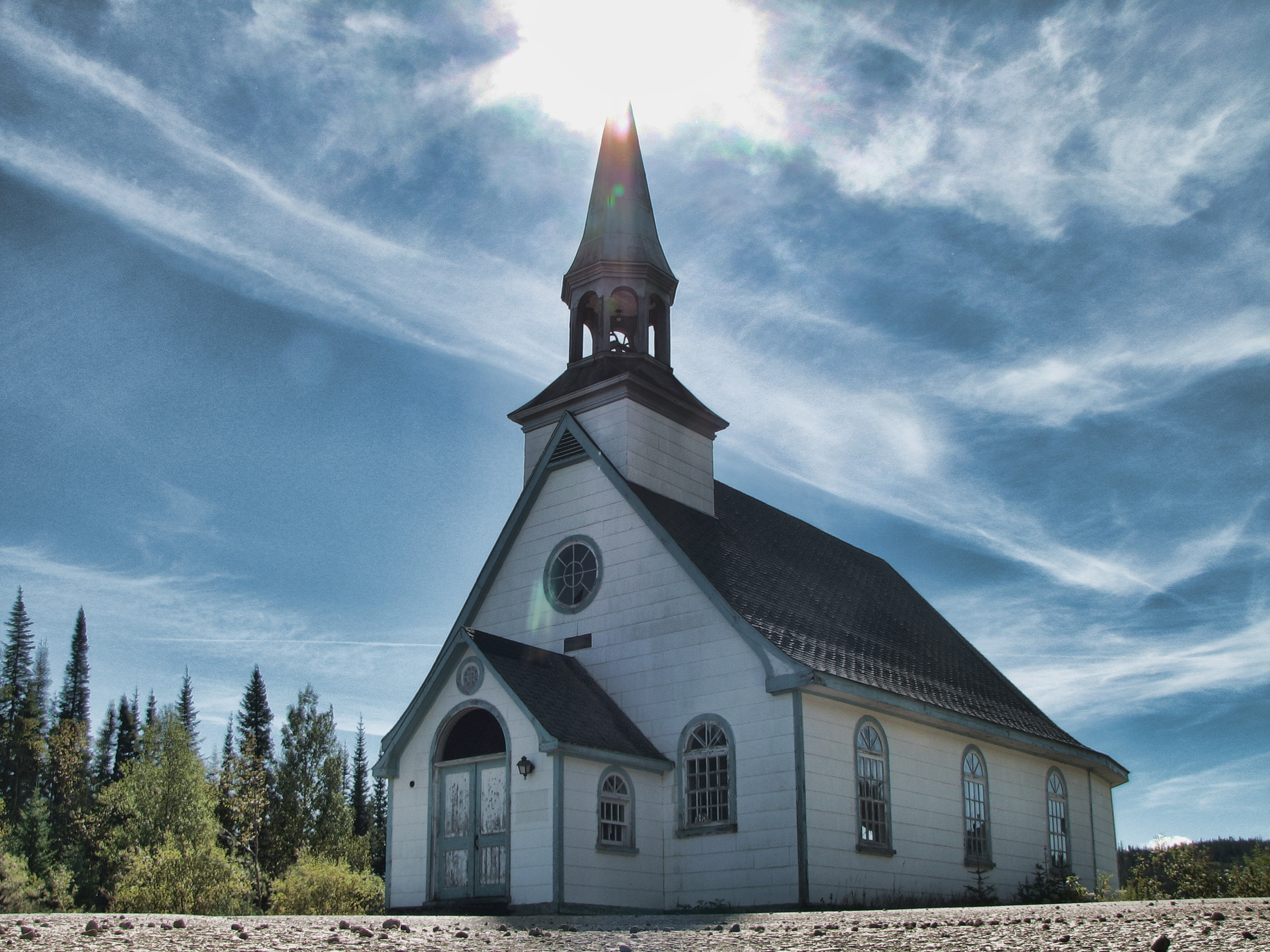 La Chapelle Notre-Dame-de-L'Assomption, dans la réserve faunique des Laurentides, en 2010.